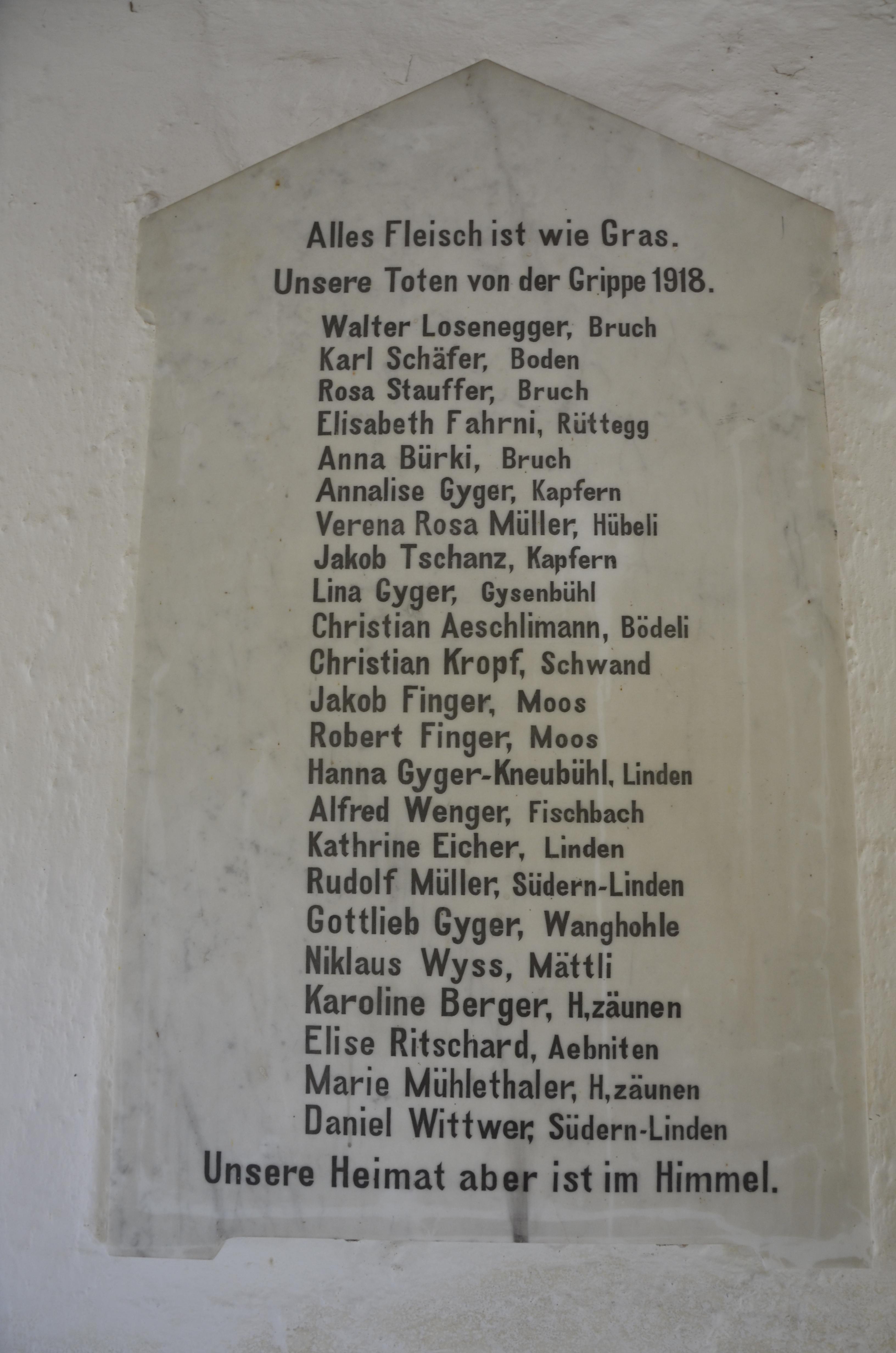 Gedenktafel für die Toten der Spanischen Grippe 1918, an der Aussenfassade der Kirche Schwarzenegg, Gemeinde Unterlangegg (Kanton Bern, Schweiz)